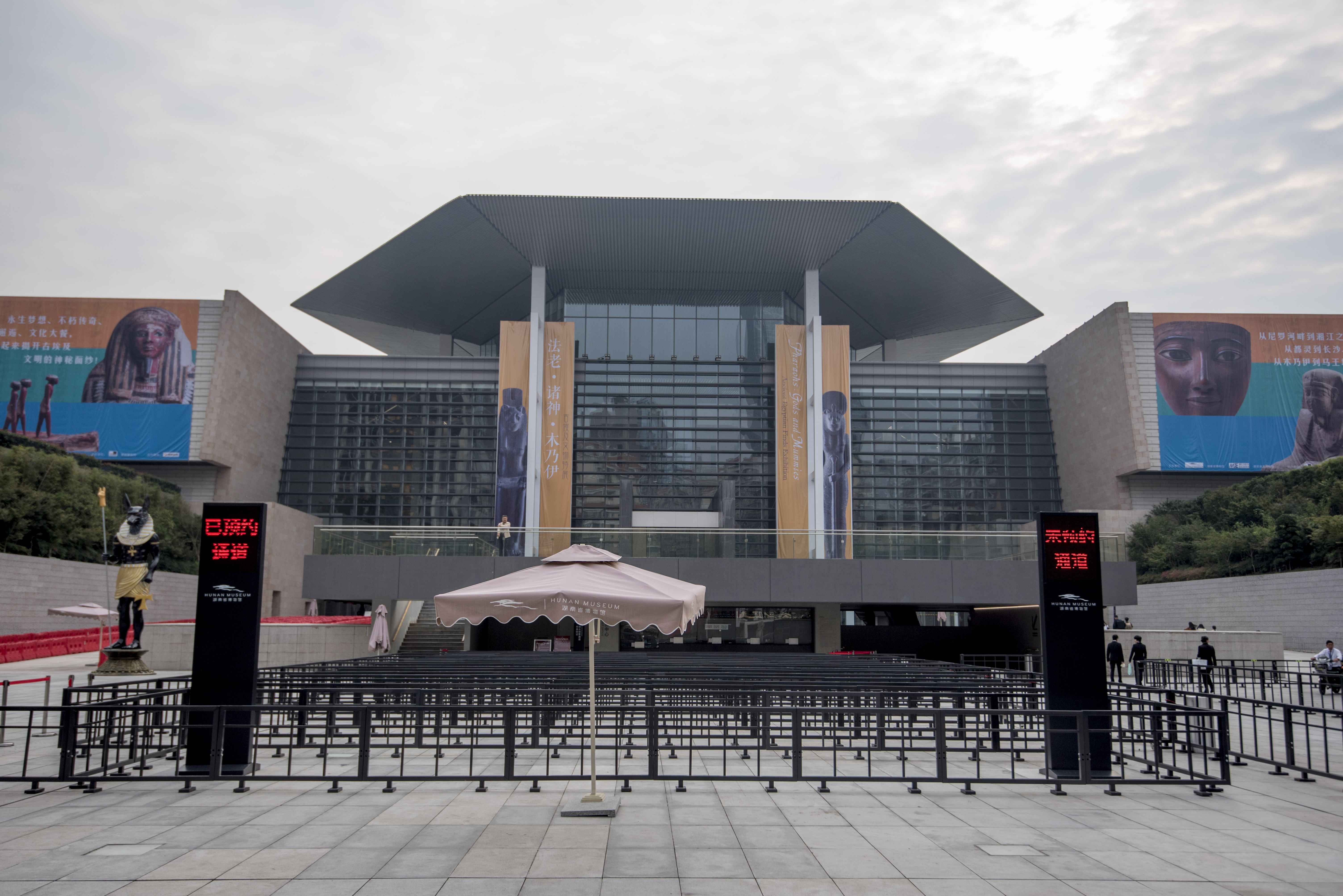 湖南省博物馆新馆入口